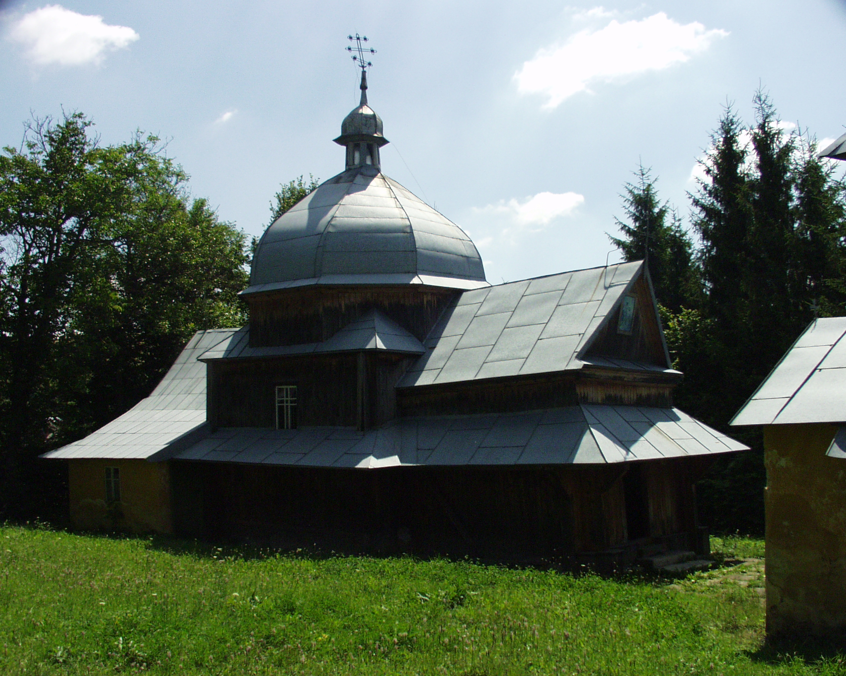 Стара Бачівська церква: Стара Бачівська церква